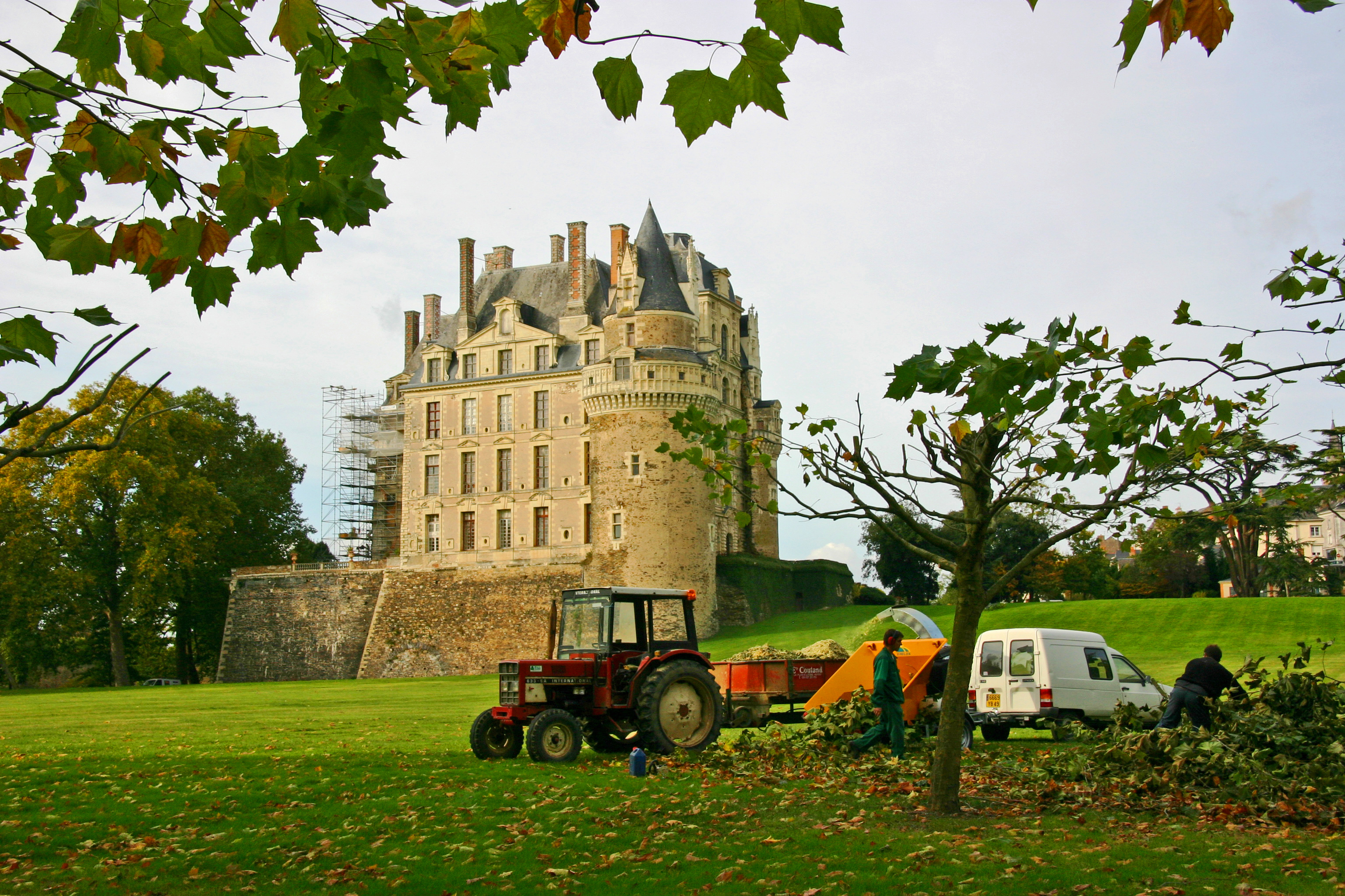 Schloss Brissac